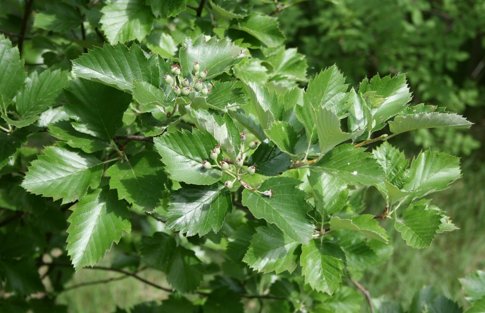 Sorbus semiincisa, Rosengewächse (Rosaceae) - Ungarn/Magyarország/Hungary: Pest megye, Szénás-Hügel bei Pilisszentiván